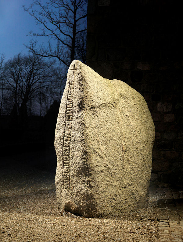 Foto af Roberto Fortuna